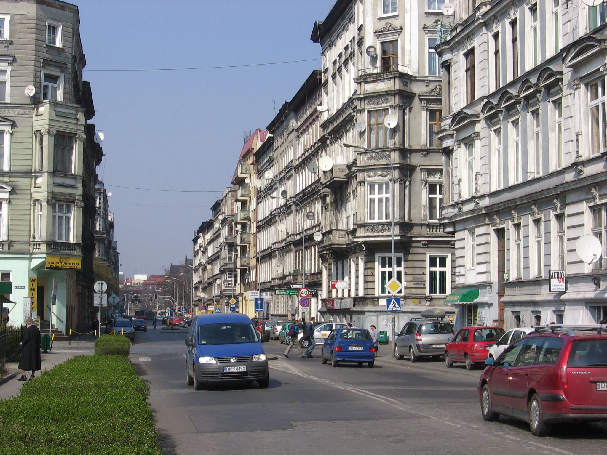 Ulica Trzebnicka we Wrocławiu widziana z placu św. Macieja w kierunku północnym; w odległej perspektywie ulicy widoczne są gmachy z czerwonej cegły - z prawej szpitala MSW, z lewej Kolegium Nauczycielskiego